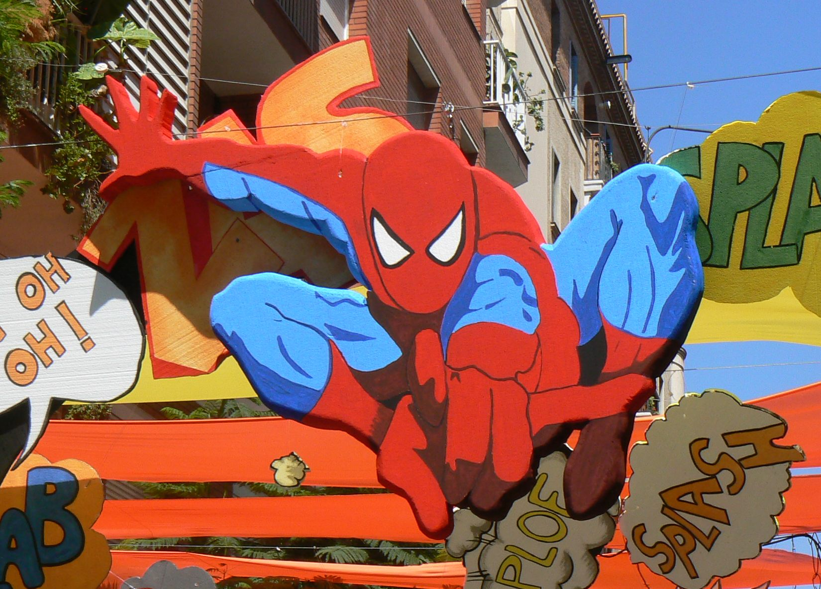 Carrer Bruniquer decorat amb el tema dels superherois i el comic, amb motiu de les festes majors del barri de Gràcia (a Barcelona) de 2010. L'entrada al carrer anava pressidida per n'Spiderman (l'home aranya).